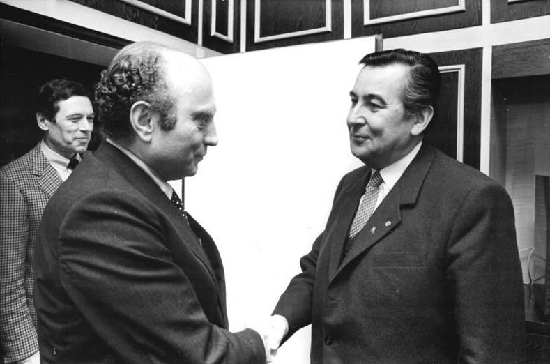 ADN-ZB Kluge Leipzig 18.3.82-Horst Sölle, Minister für Außenhandel der DDR empfing BRD-Minister Otto Graf Lambsdorff zu einem Gespräch.Im Hintergurnd links Klaus Bölling, Leiter der Ständigen Vertretung der BRD in der DDR.